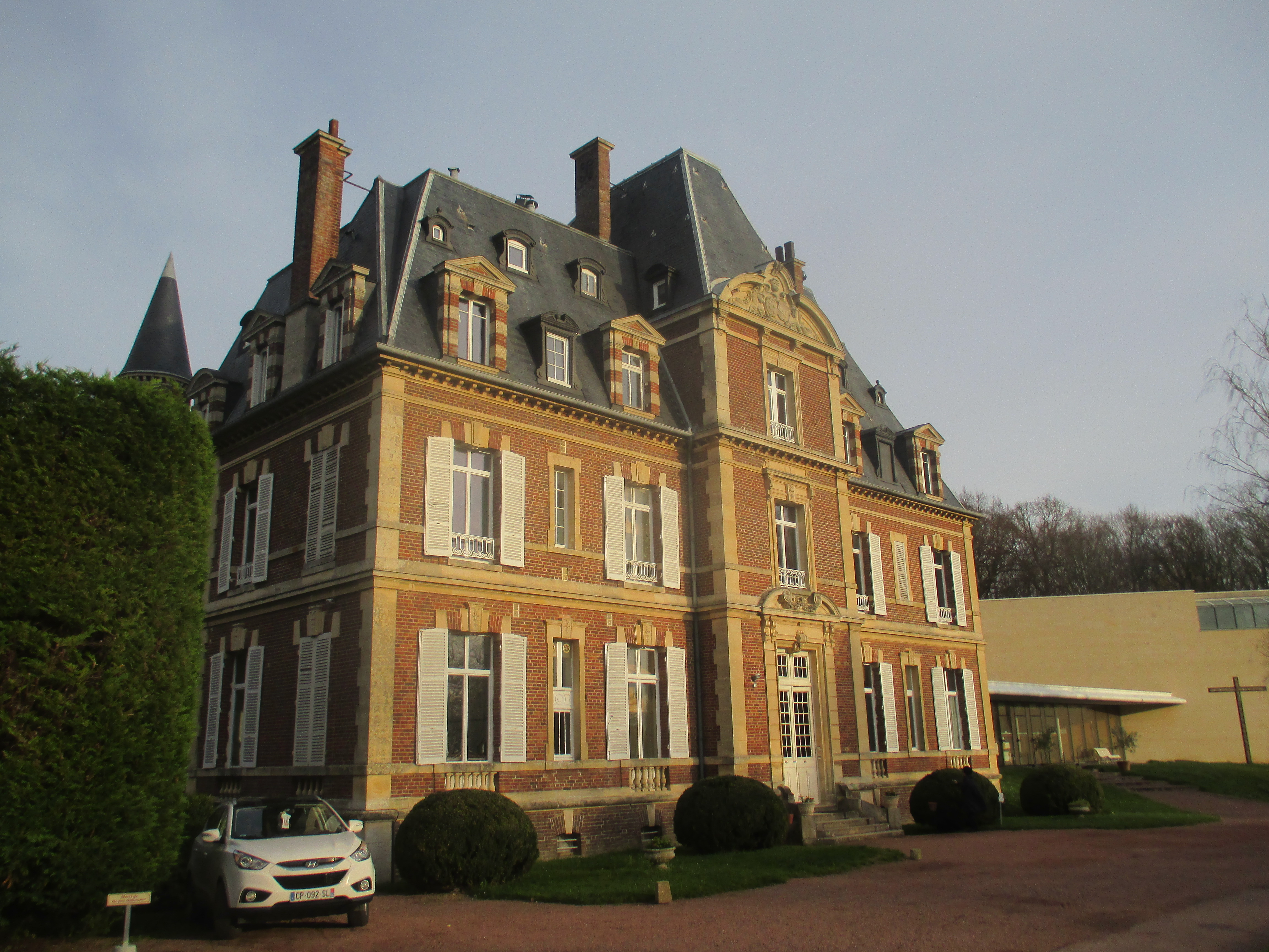 Vue du château de Troussures avec sa chapelle à droite. Il appartient à la Communauté Saint-Jean.